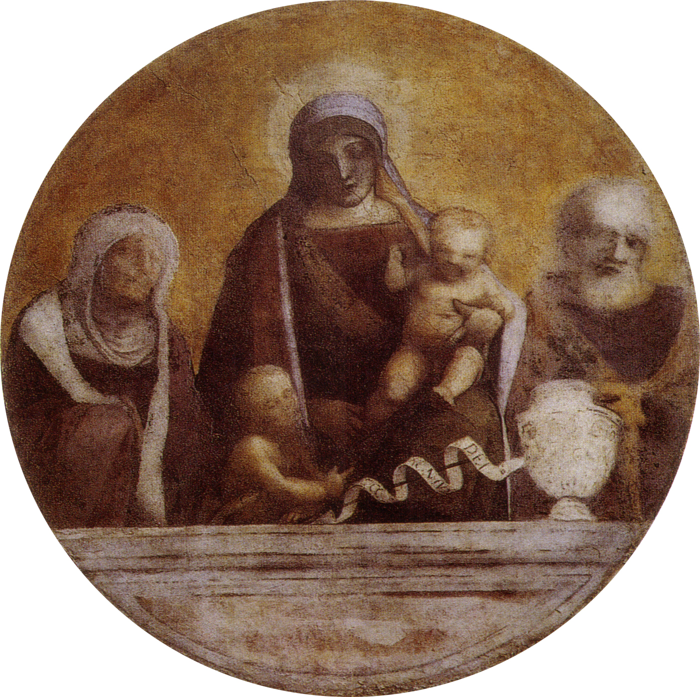 Correggio, sacra famiglia coi santi elisabetta e giovannino